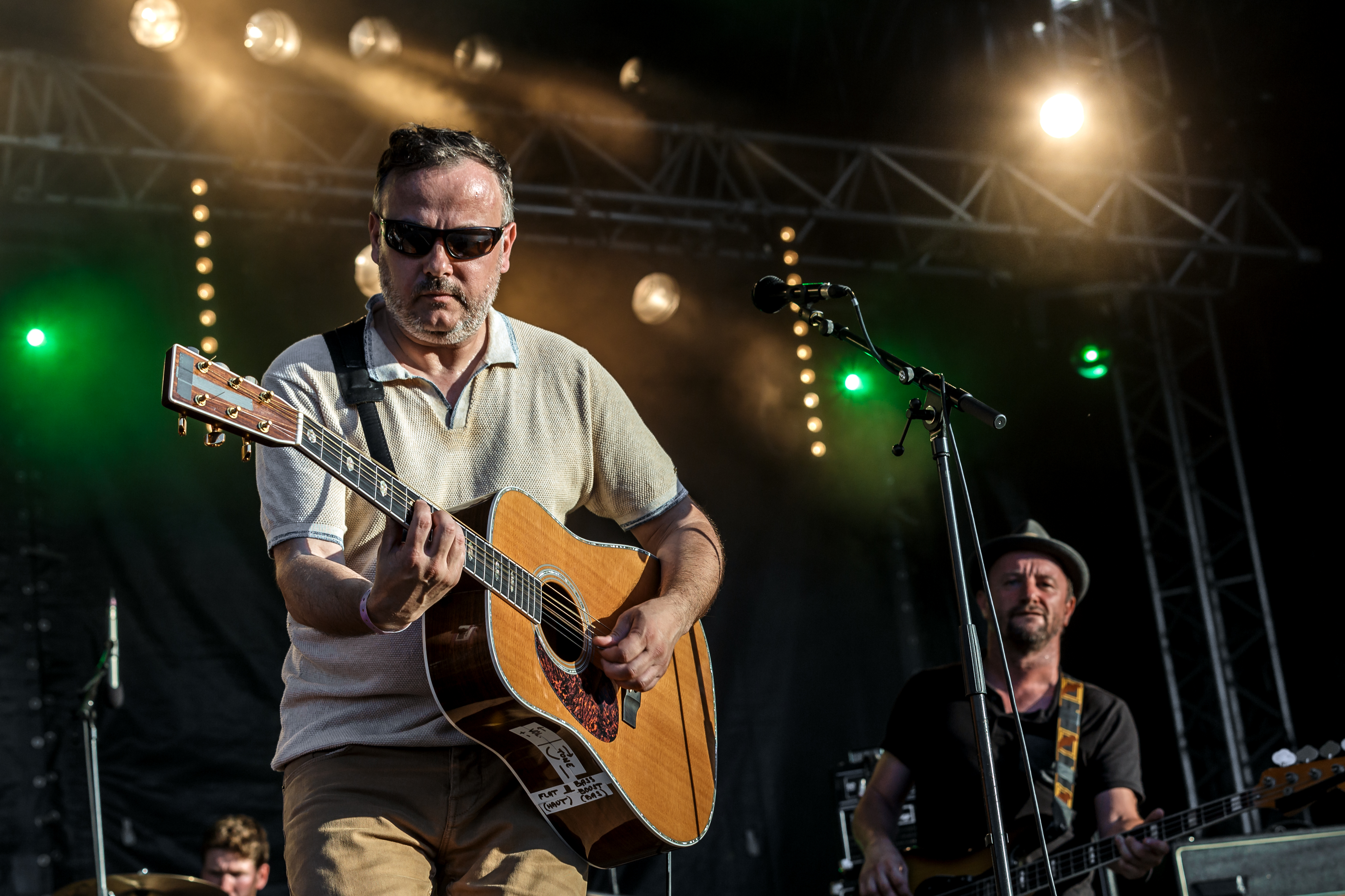 Mickey3d en concert exceptionnel RTL2 sur la grande scène de Brest 2016 le 18 juillet.